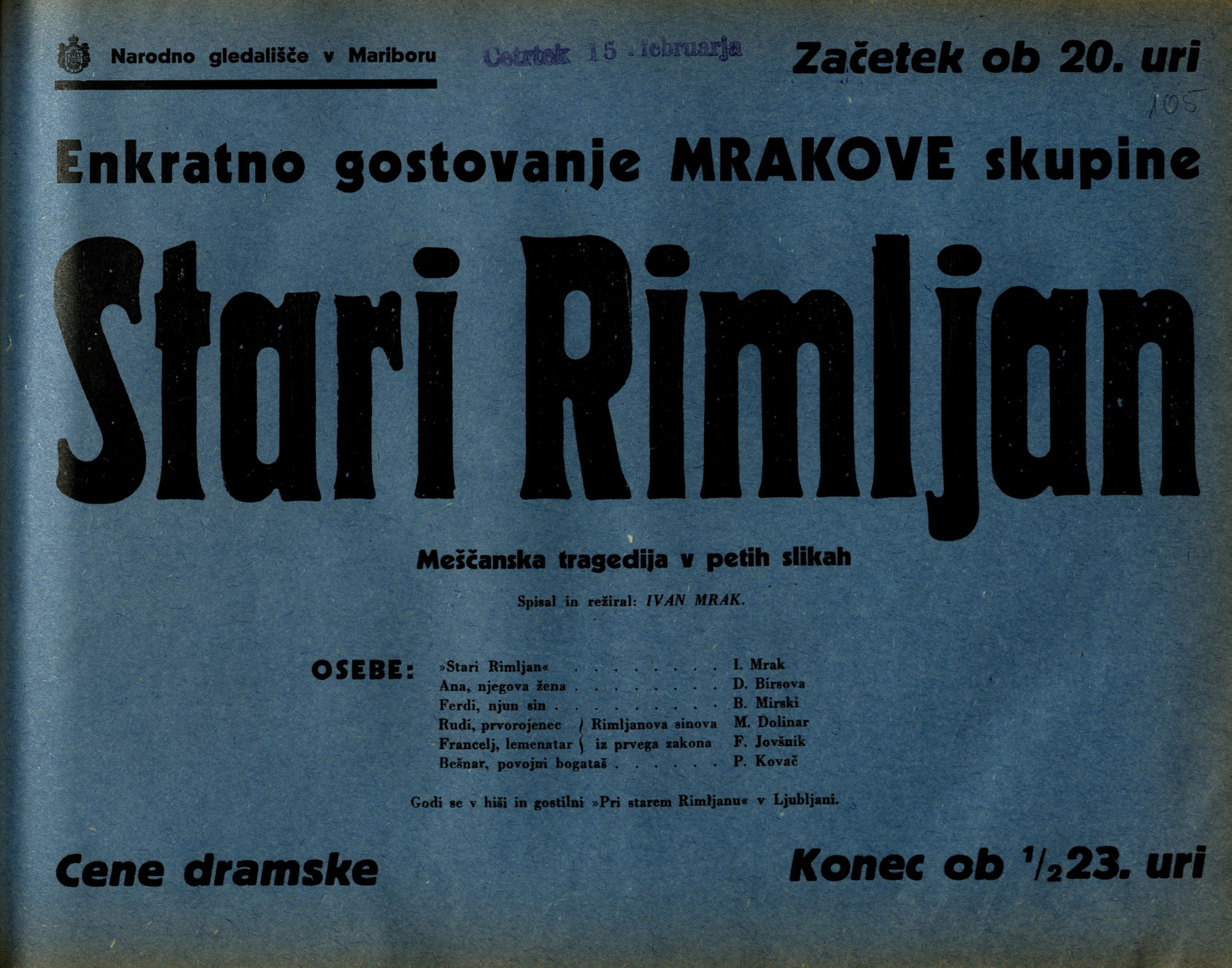 Plakat za predstavo Stari Rimljani v Narodnem gledališču v Mariboru.